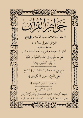 طبعة كتاب جواهر القرآن - سنة ١٣٢٩ هـ. مكتبة كردستان العلمية